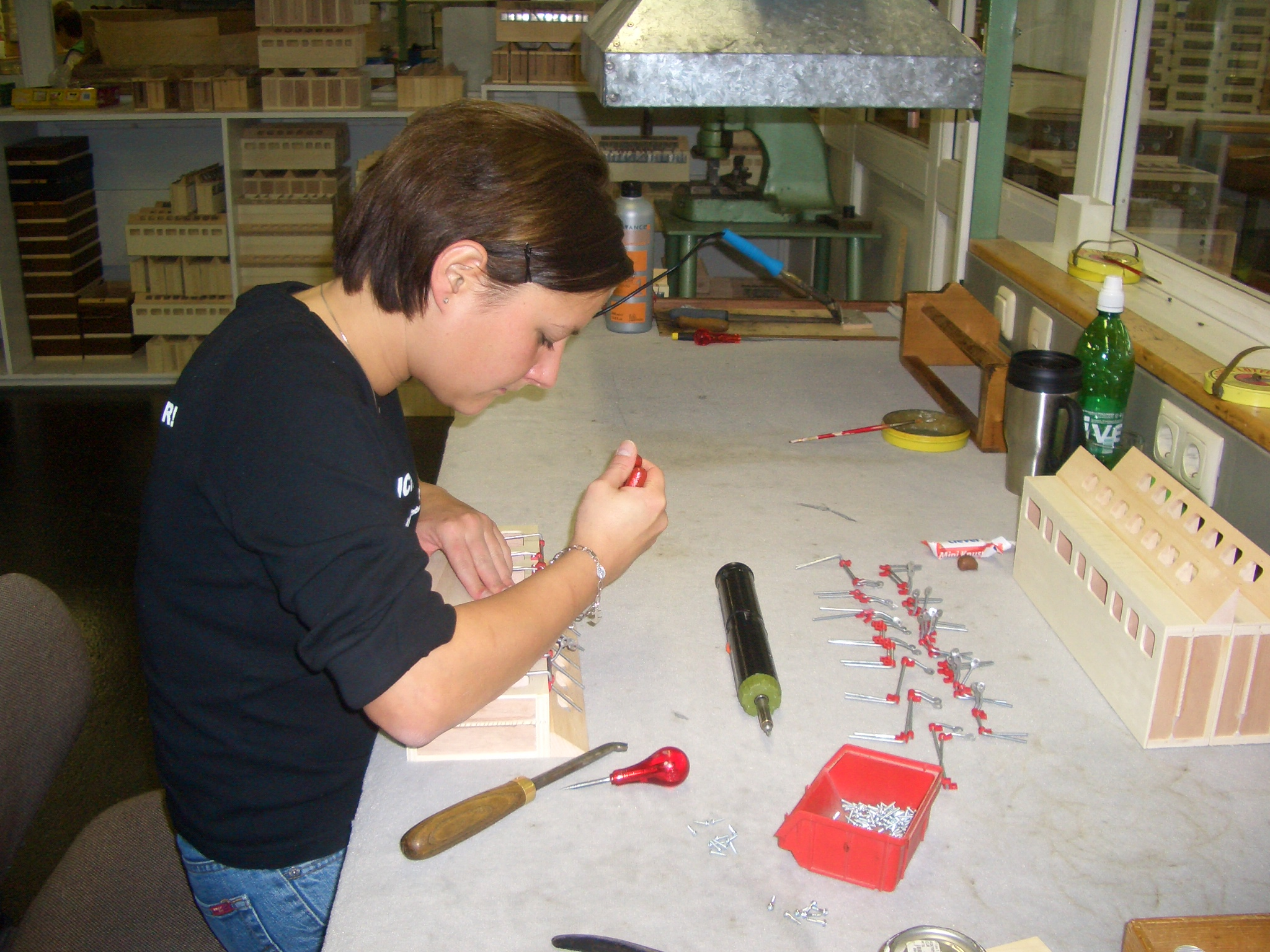 Müller-Werksführung